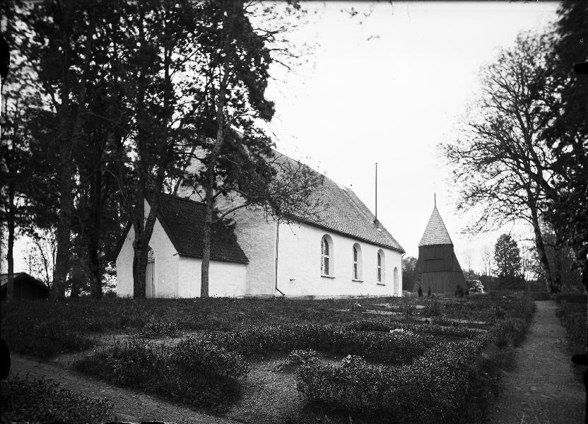 Kyrkan från sydväst.